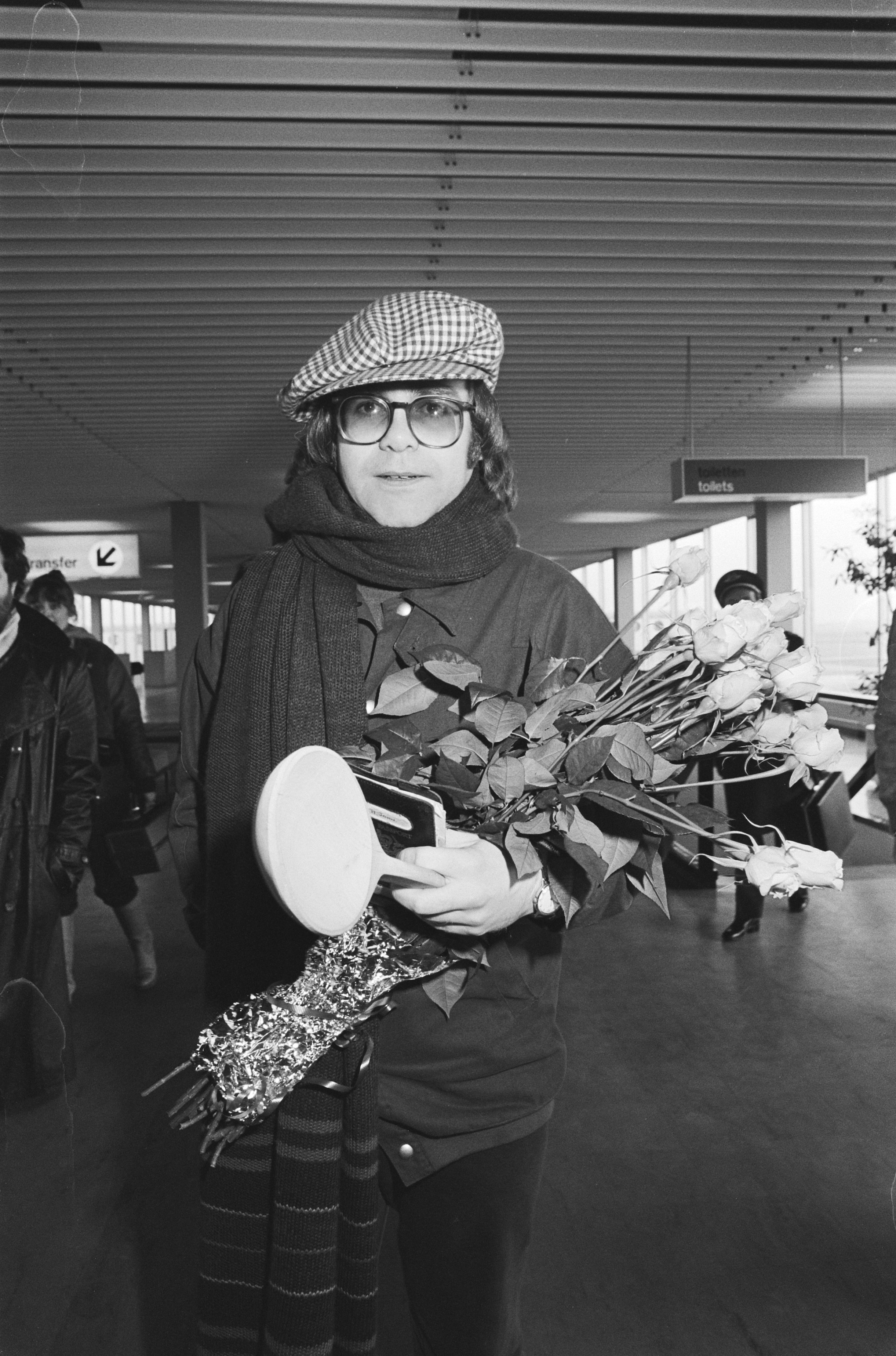 Collectie / Archief : Fotocollectie Anefo Reportage / Serie : [ onbekend ] Beschrijving : Aankomst Elton John op Schiphol Datum : 11 februari 1979 Trefwoorden : aankomsten, zangers Persoonsnaam : Elton John Fotograaf : Dijk, Hans van / Anefo Auteursrechthebbende : Nationaal Archief Materiaalsoort : Negatief (zwart/wit) Nummer archiefinventaris : bekijk toegang 2.24.01.05 Bestanddeelnummer : 930-1162